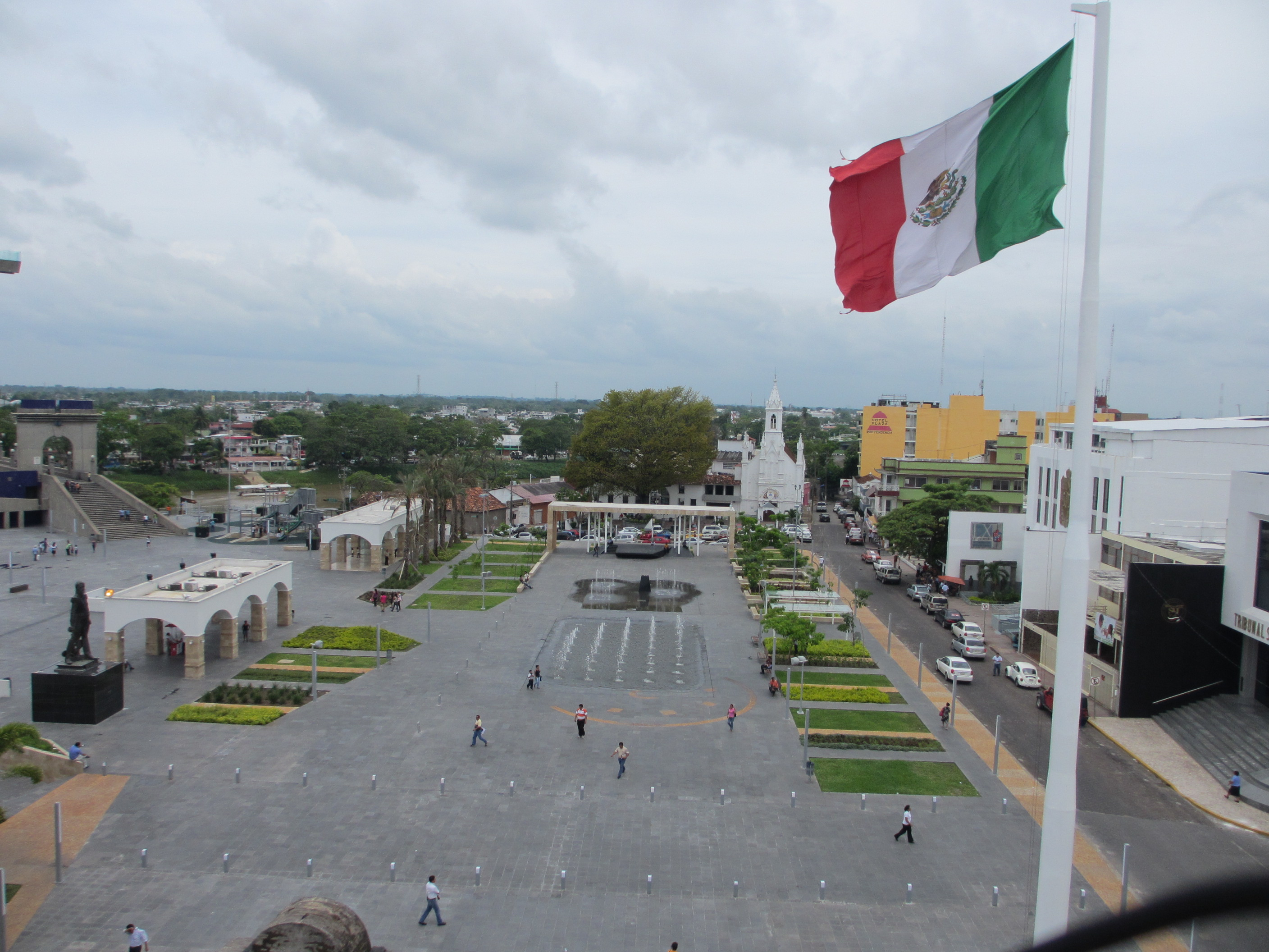 Vista de la Plaza de Armas de Villahermosa, desde el Palacio de Gobierno, después de su remodelación en el 2011. En la ciudad de Villahermosa, estado de Tabasco, México.